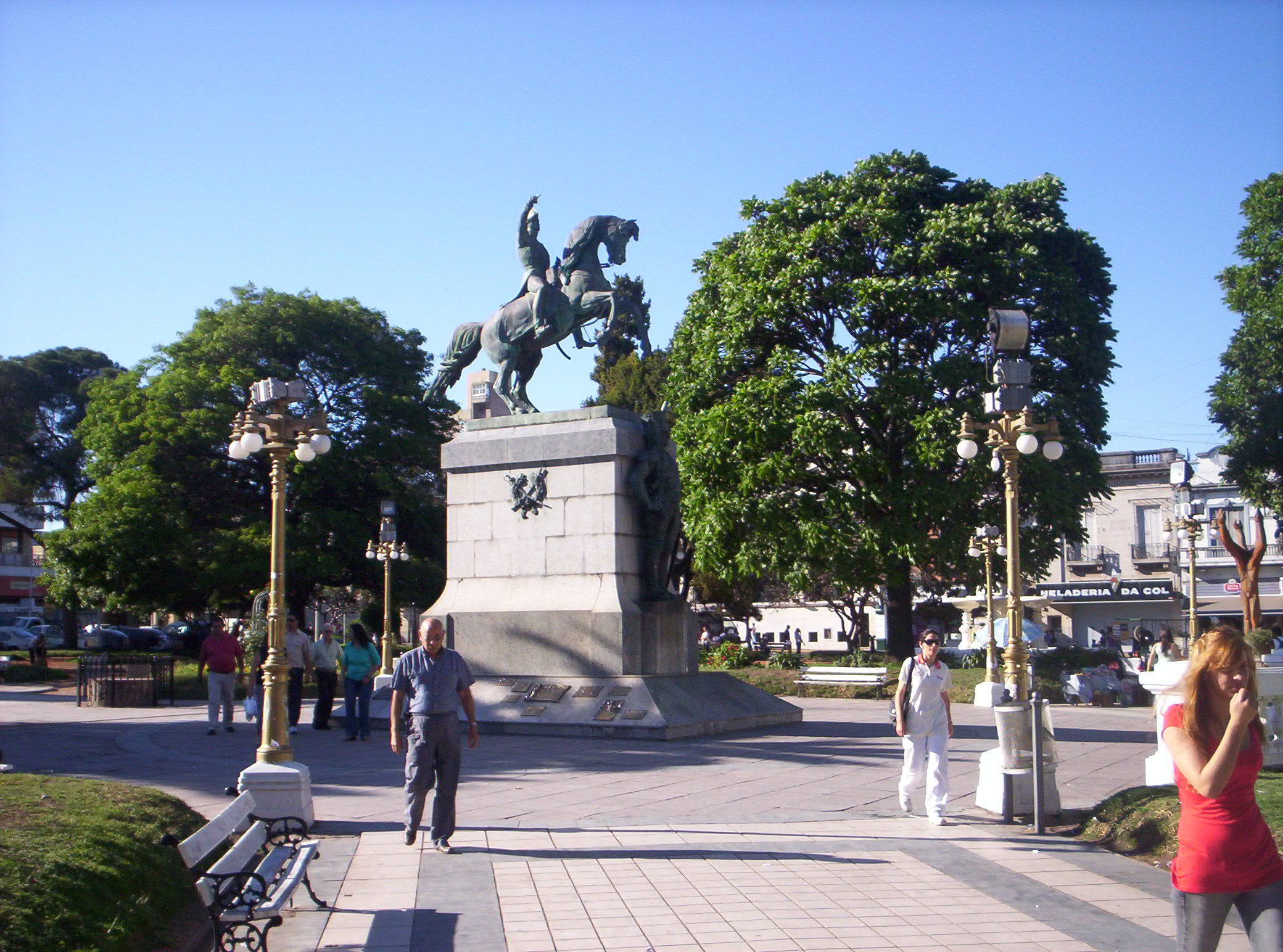 monumento al libertador san martin en parana